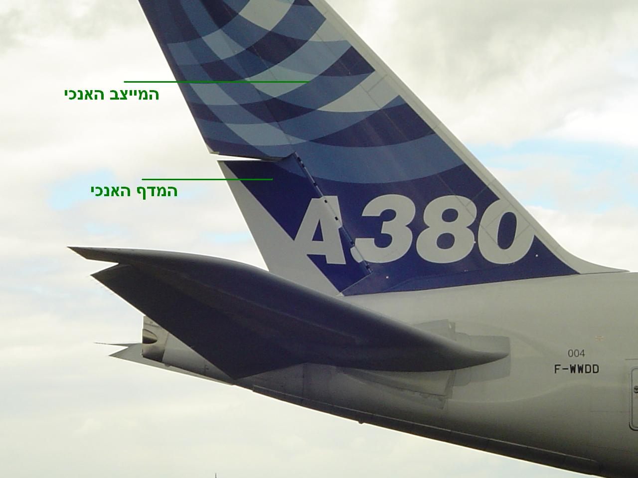 original desc: Leitwerk des Airbus A380 auf der ILA 2006. I added Hebrew Captions.